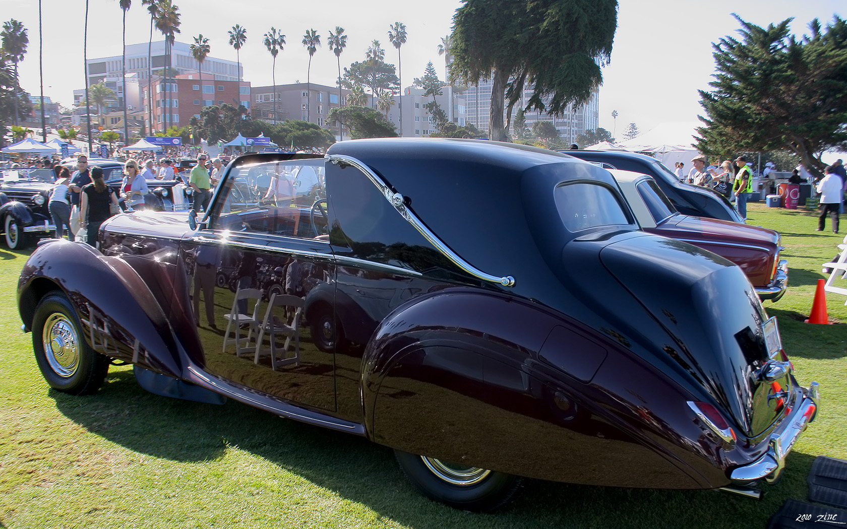 1954 1948 Bentley coupé de ville La Jolla Motor Car Classic, Jan 10, 2010